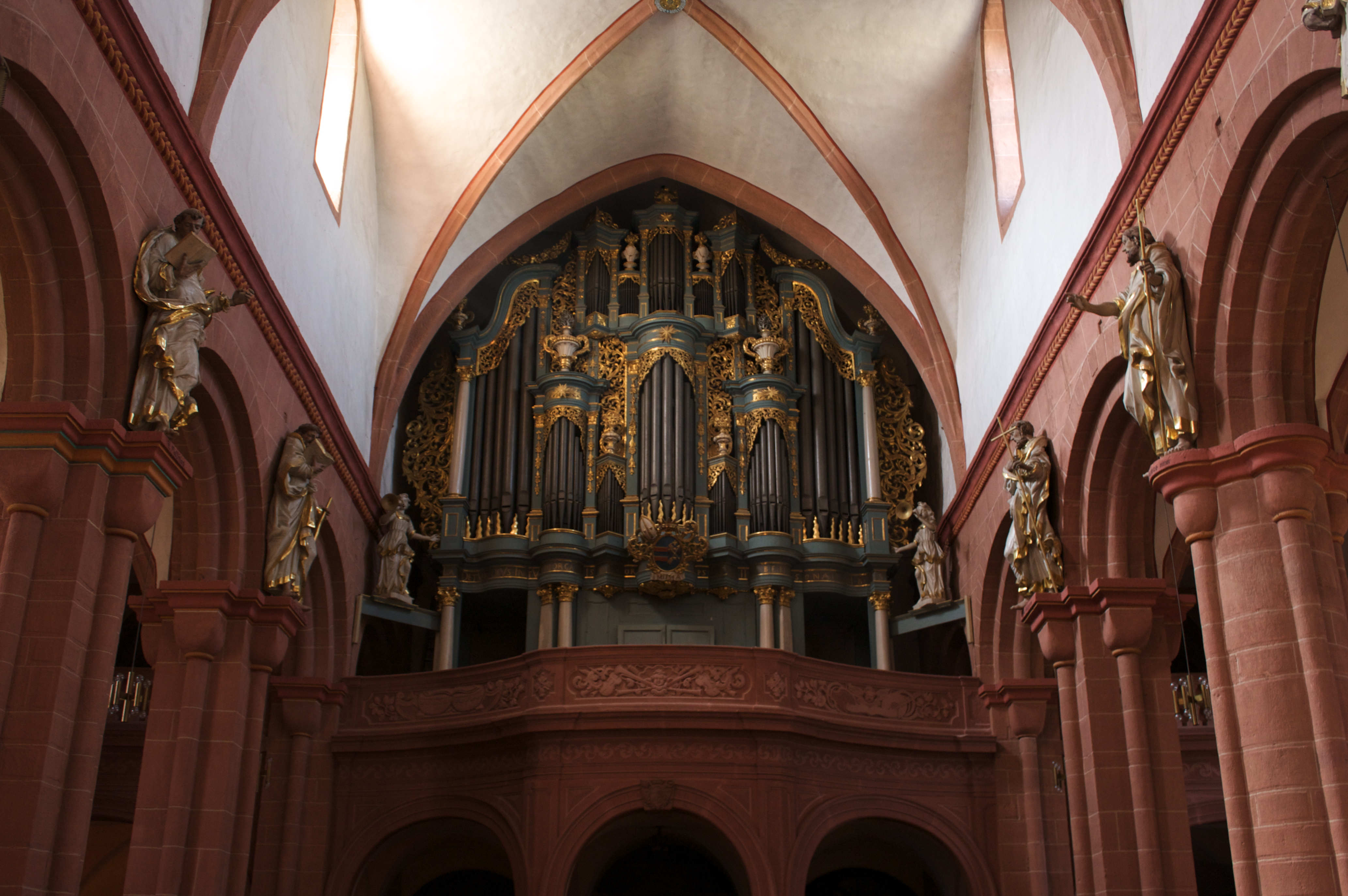 Ilbenstadt Basilika St. Maria, Petrus und Paulus, interior.